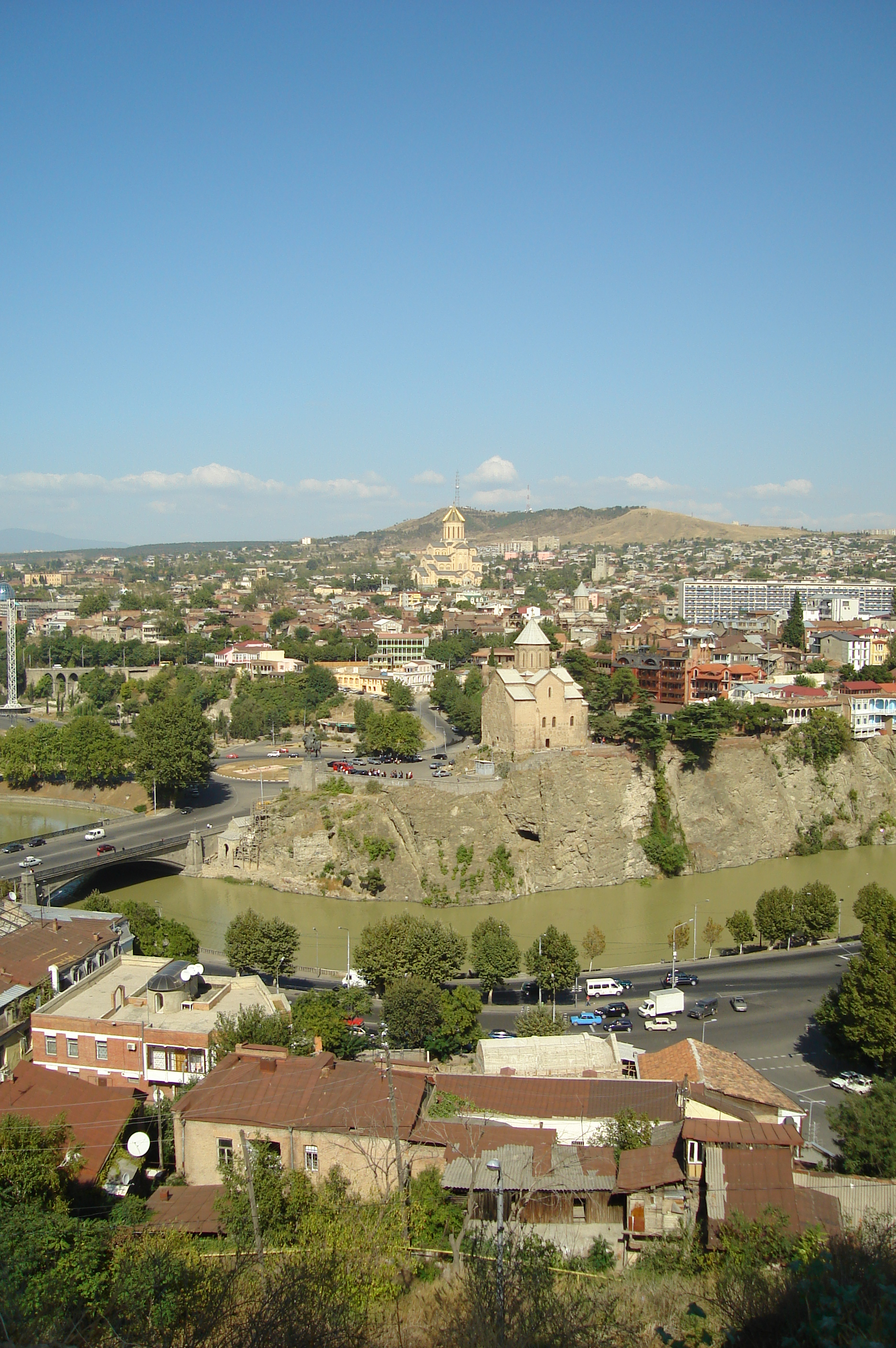 Metekhi, Tbilisi